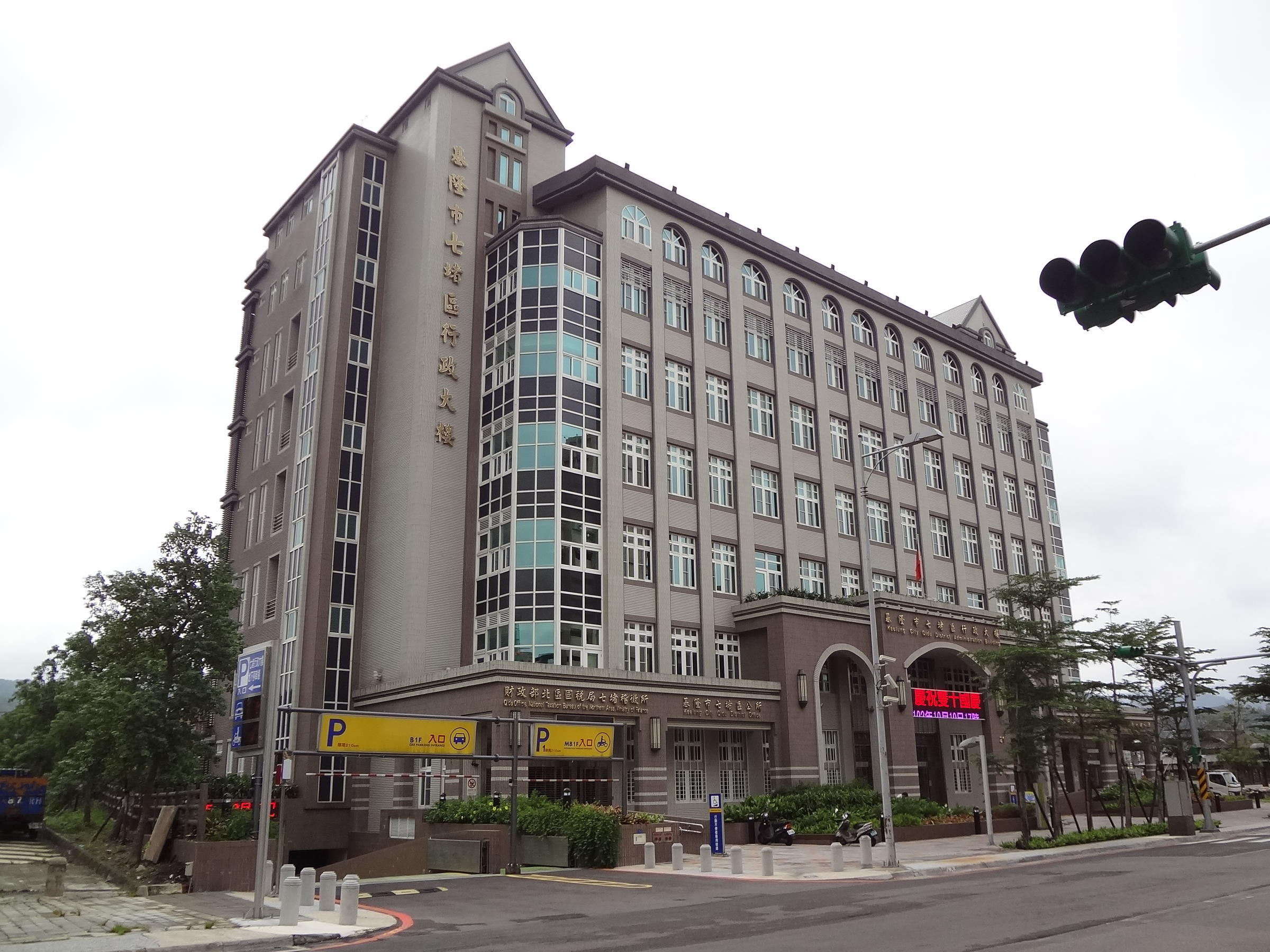 基隆市七堵區行政大樓，位於基隆市七堵區光明路21號。